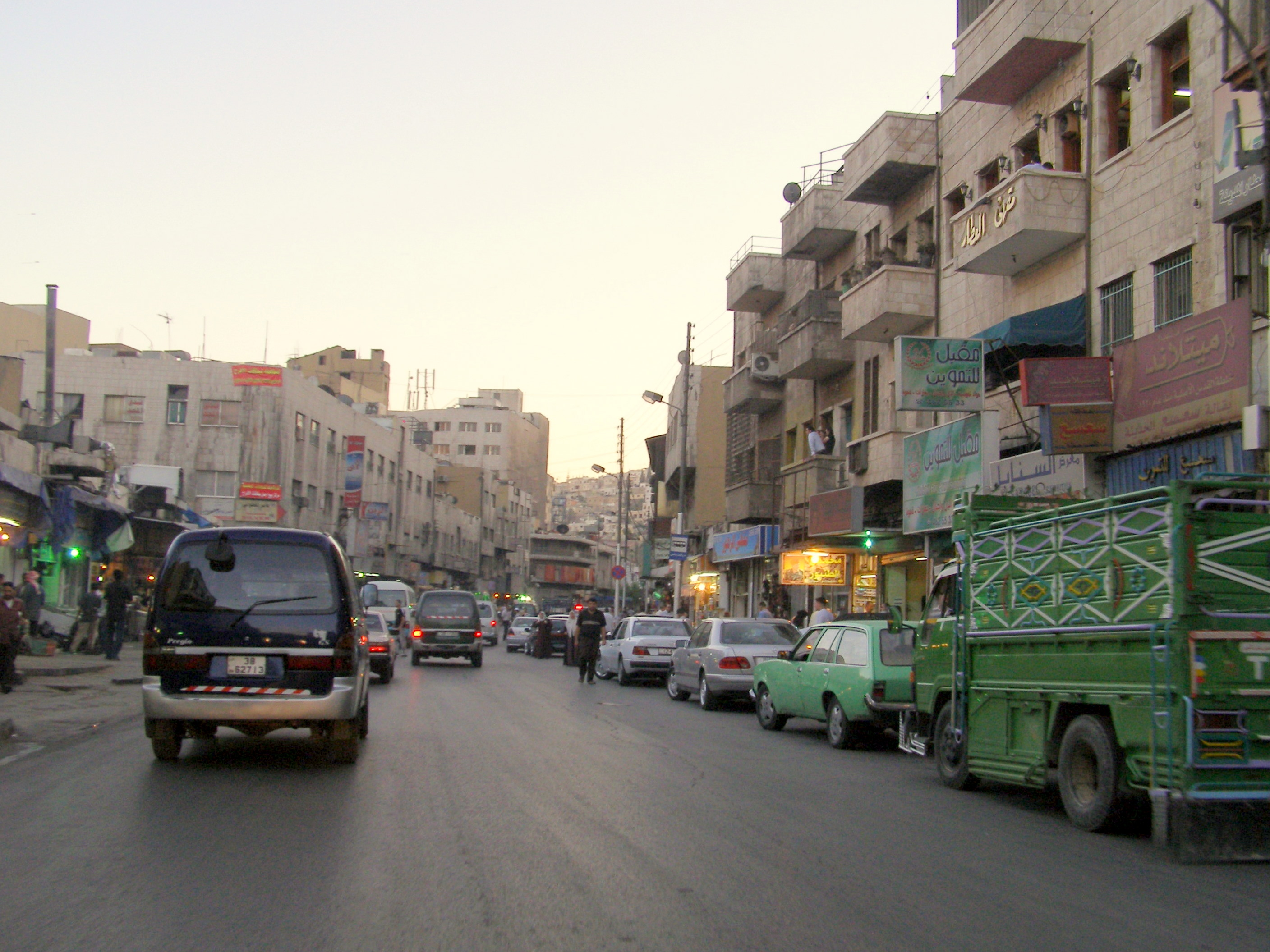 Talal Street Amman شارع طلال (وسط البلد) في عمّان